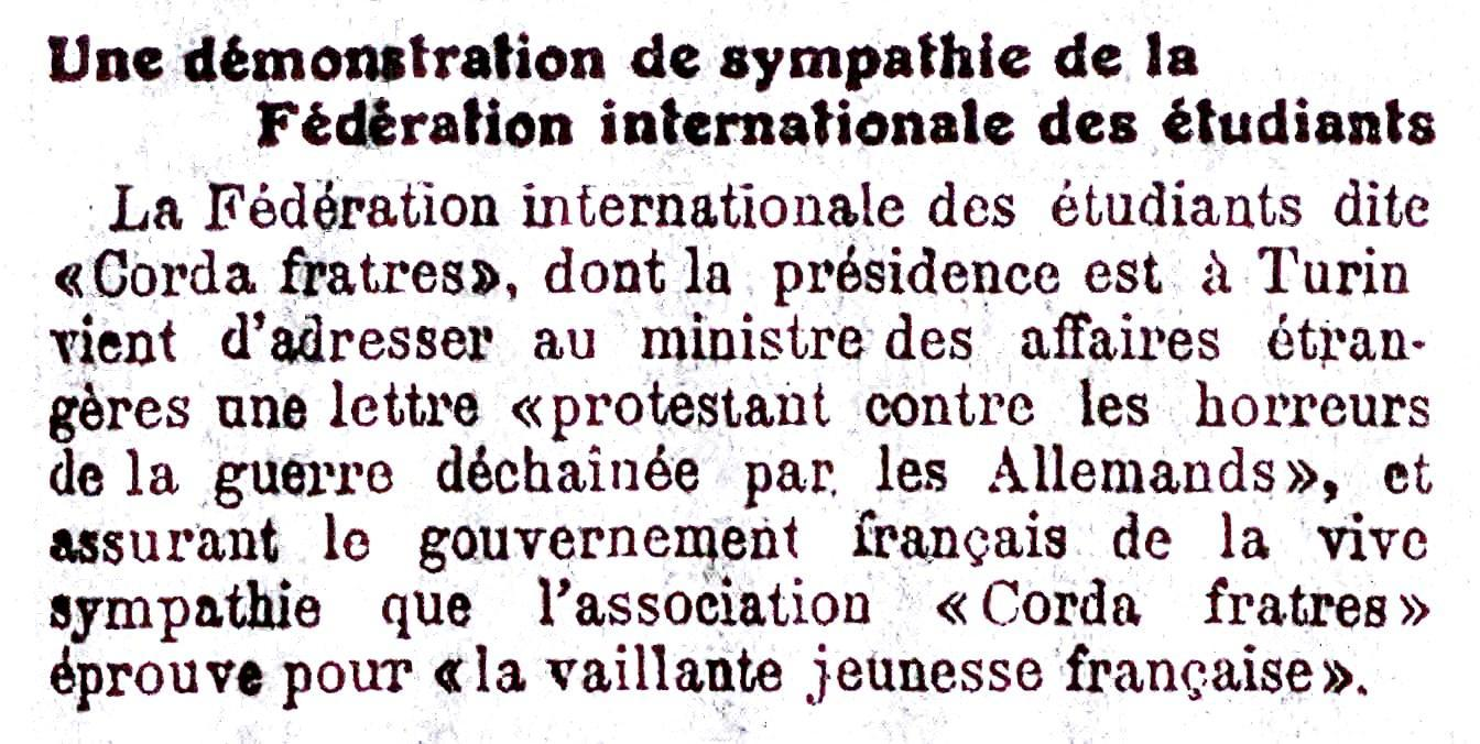 Article du Temps sur la Corda Fratres.